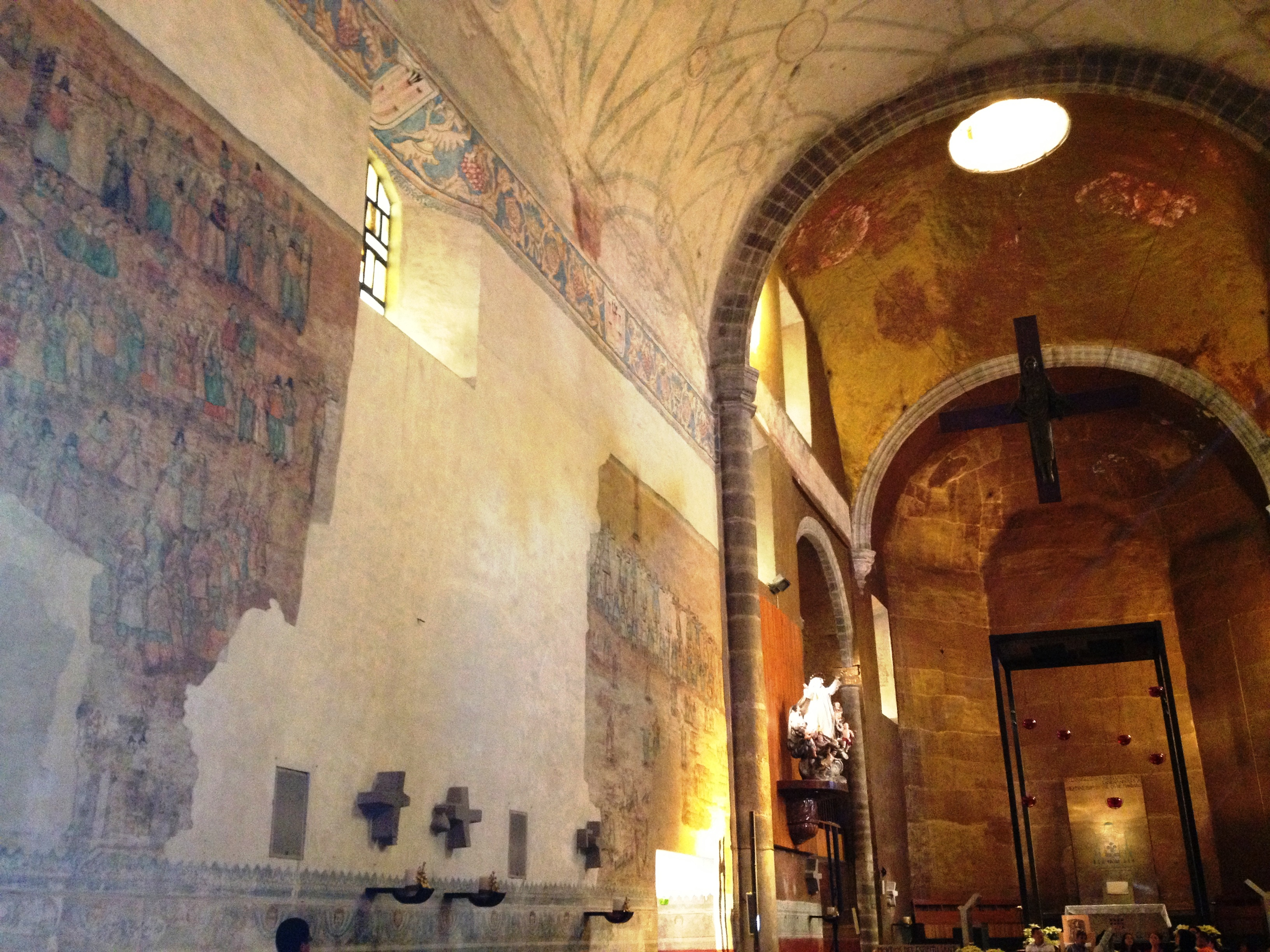 Interior de la Catedral de Cuernavaca, Mexico.